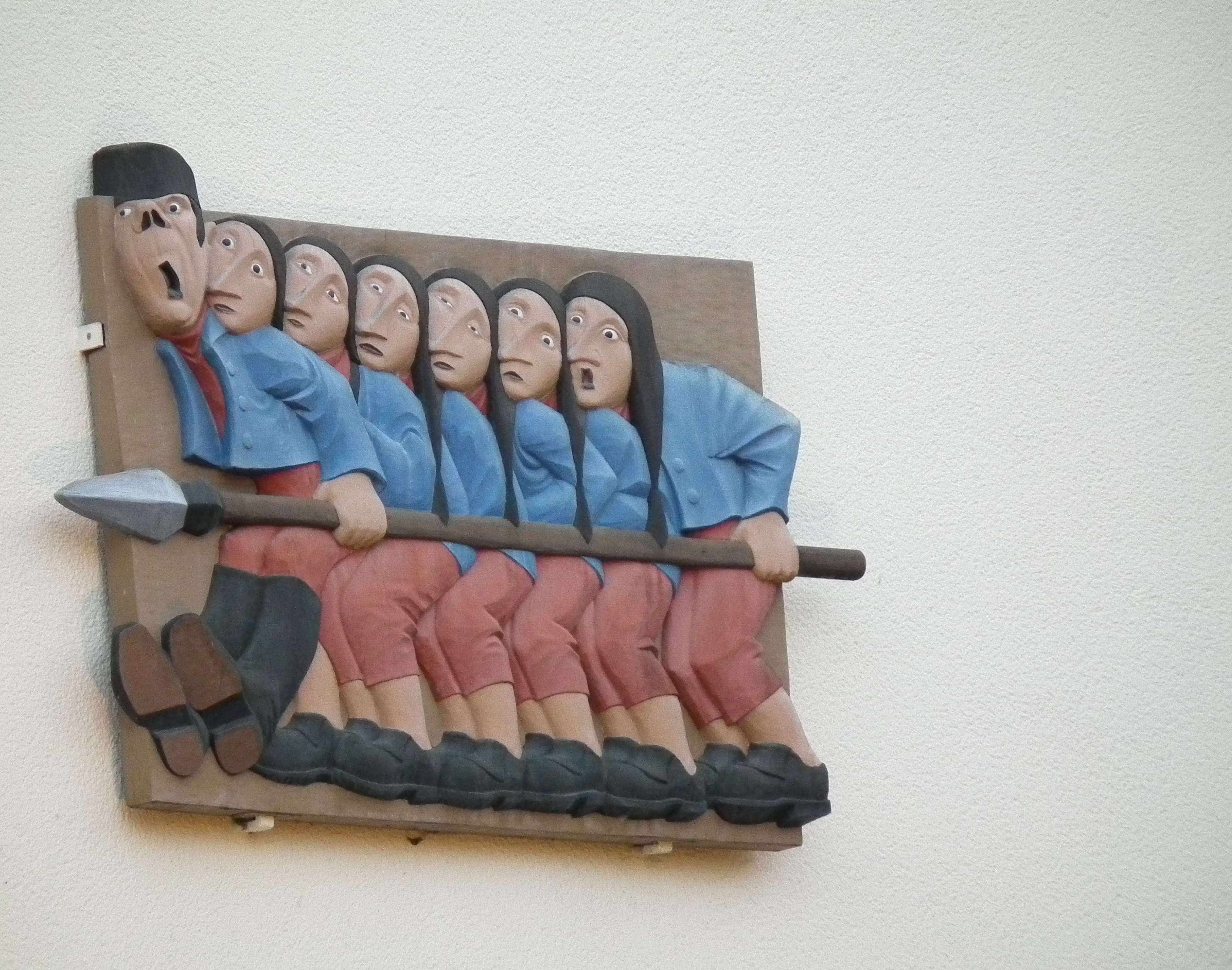 Relief der Sieben Schwaben an der Sieben-Schwaben-Apotheke in Laupheim (Baden-Württemberg, Deutschland)